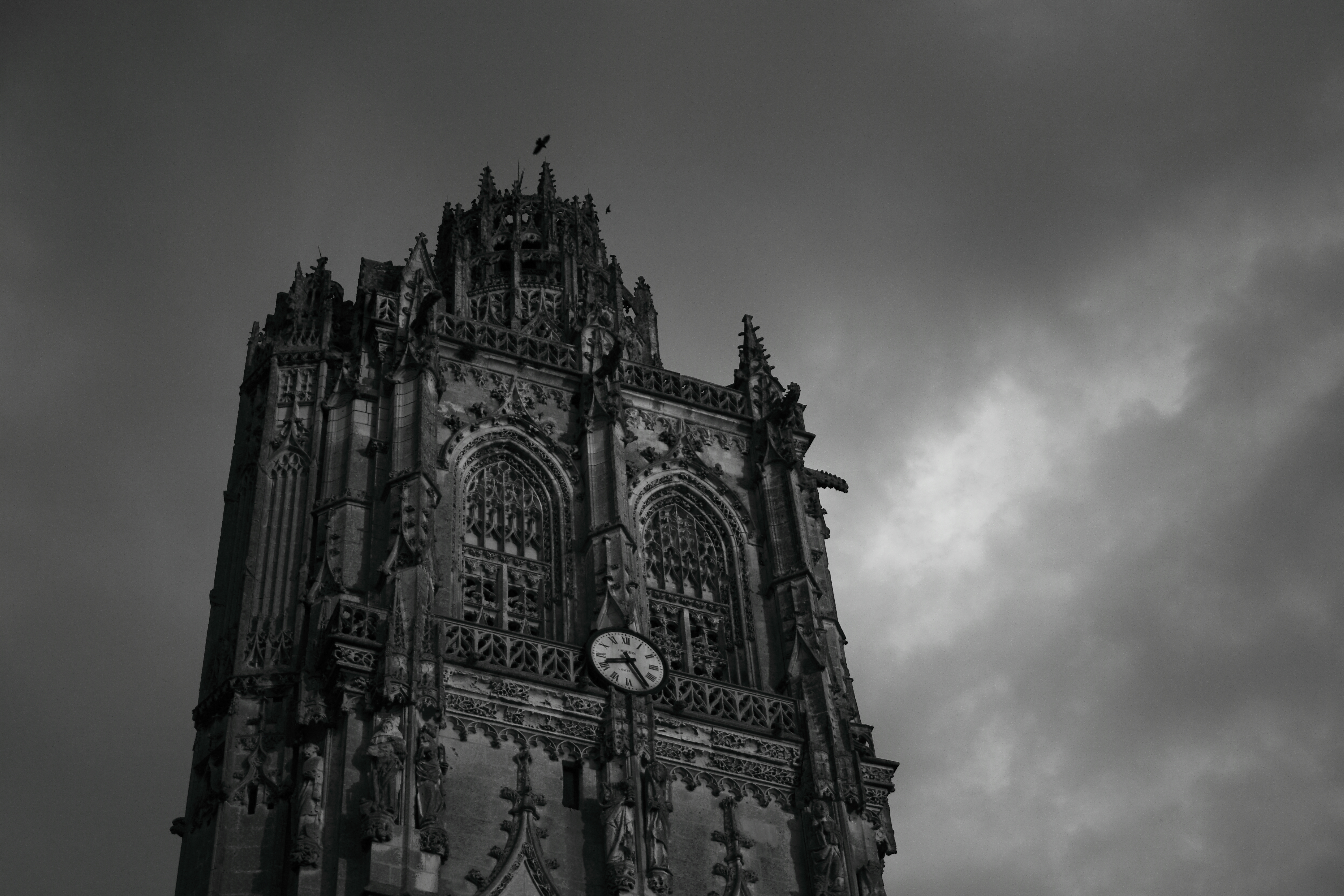 L'église de la Madeleine est située à Verneuil-sur-Avre (Eure). Sa tour de 56 m de haut, visible des kilomètres alentours, est devenue le symbole de la ville. L'église fait l'objet d'un classement au titre des monuments historiques par la liste de 18621. La construction de l'église commence au début du xiie siècle, en même temps que la fondation et le développement de la ville. La tour est édifiée à la fin du xve siècle mais le manque de moyens interrompt le chantier durant 30 ans. C'est grâce à la générosité de l'évêque de Senlis, Artus Fillon, natif de Verneuil, qu'elle est achevée vers 1525. La richesse de sa décoration sculptée la fait justement comparer à la Tour de Beurre de la cathédrale Notre-Dame et à la tour-lanterne de l'abbatiale Saint-Ouen, toutes deux à Rouen. Le grand orgue est l'œuvre du facteur rouennais Jean-Baptiste Lefebvre (1778). Elle possède également une remarquable Mise au tombeau du xvie siècle avec des personnages polychromes.